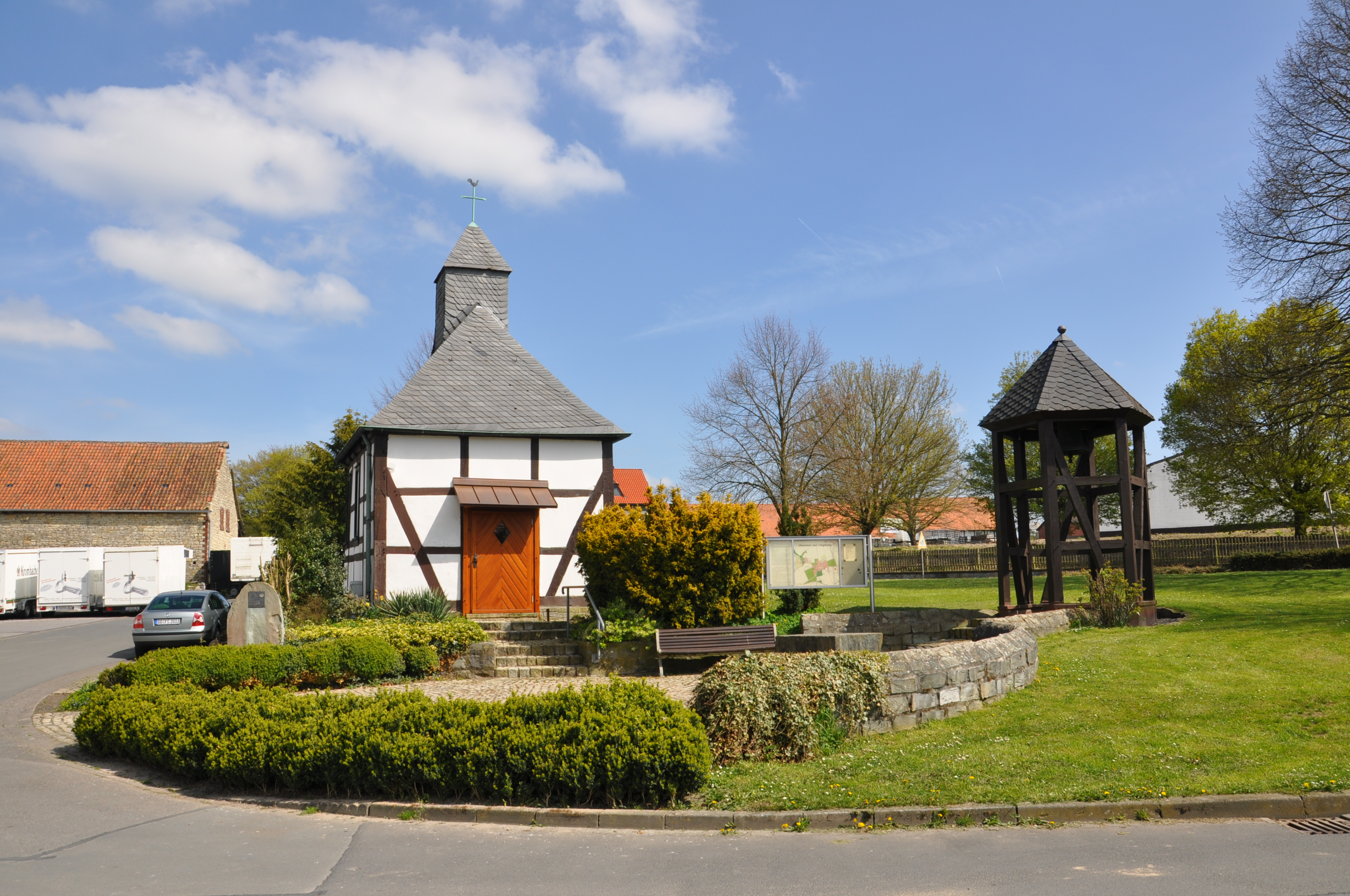 Ense-Oberense, Kapelle St. Rochus und Isidor(us) mit Glockenturm